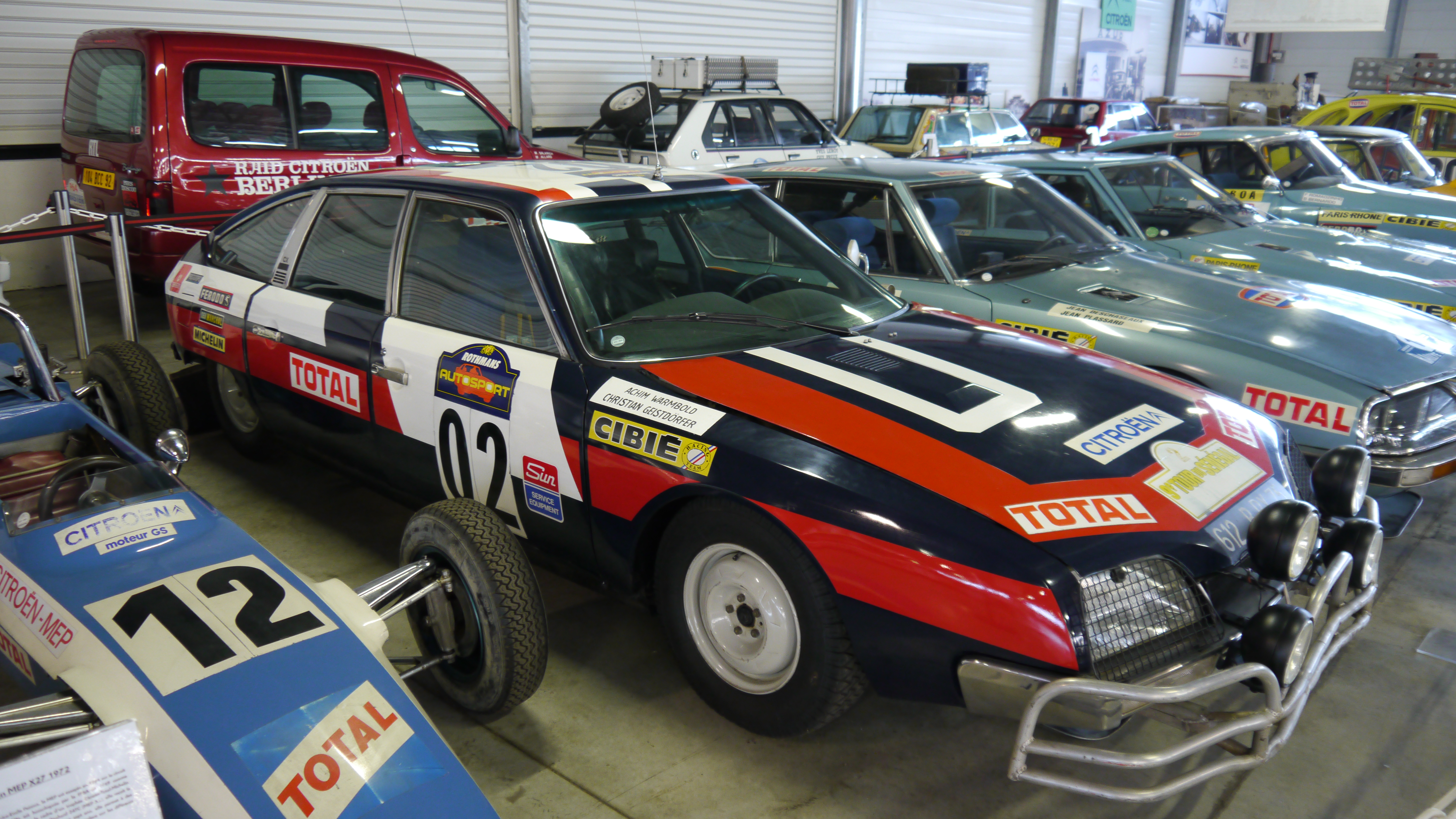 Conservatoire Citroen 142 Citroen CX Rallye